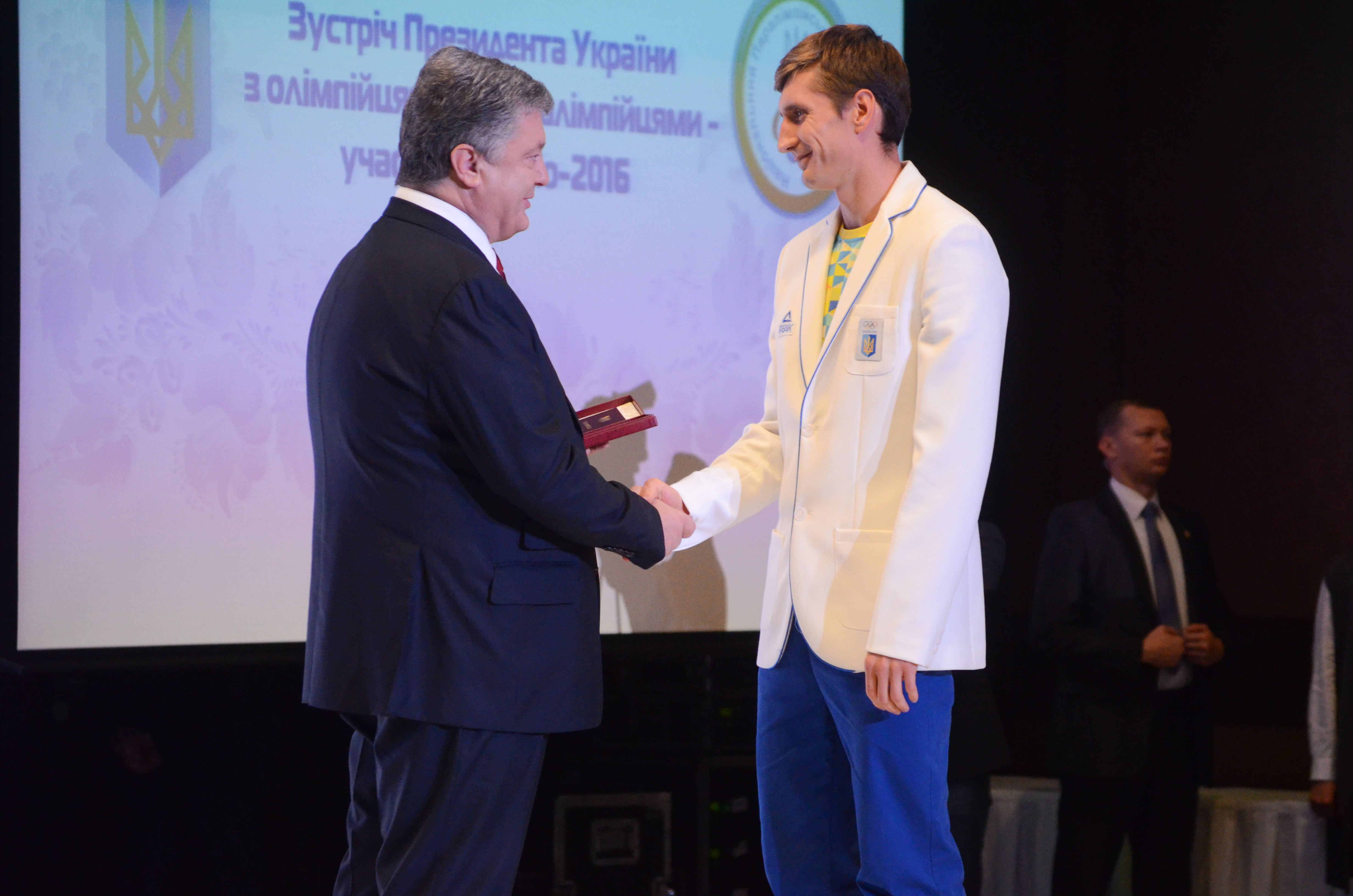 Зустріч Президента України з олімпійцями та паралімпійцями — учасниками Ріо-2016.